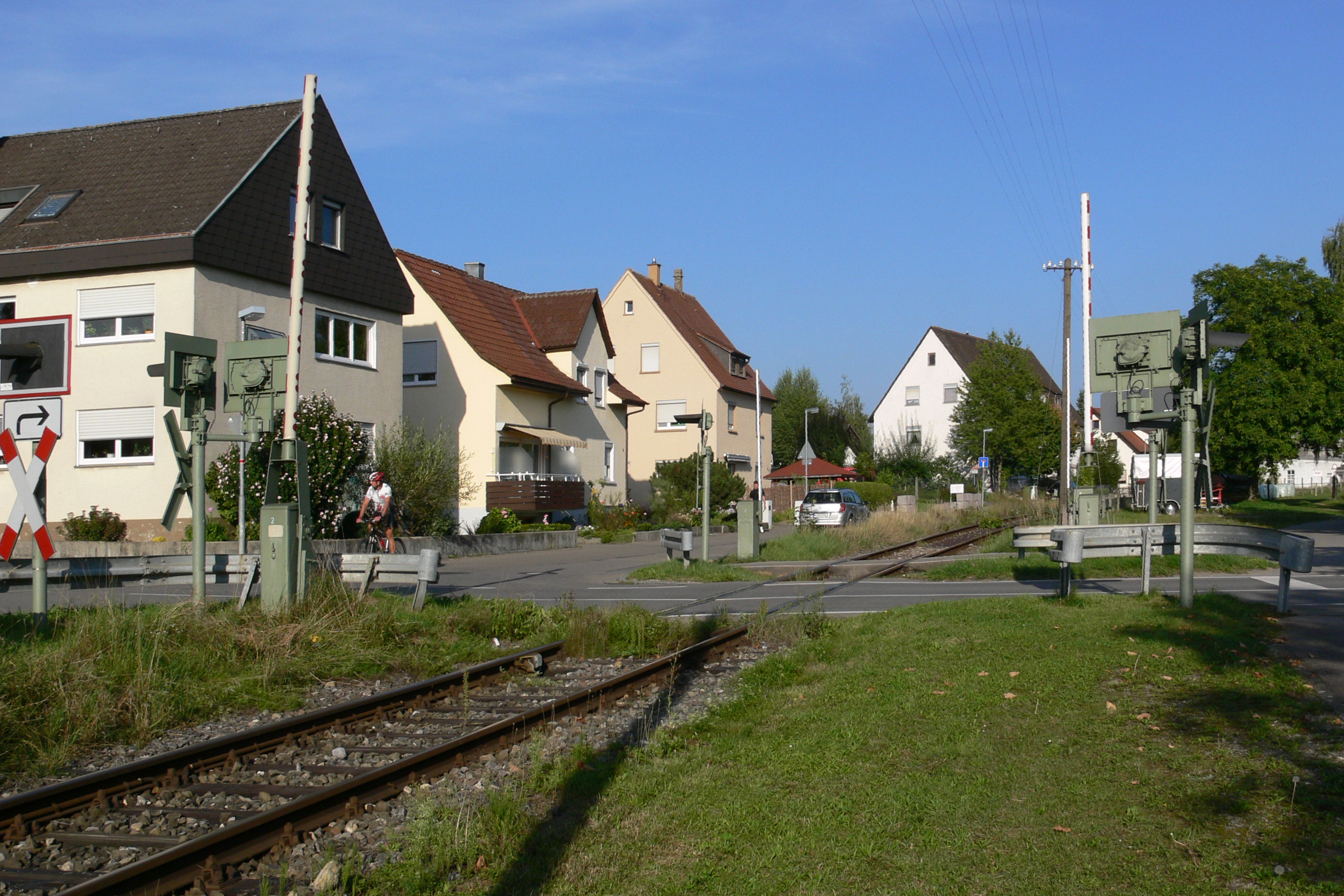 Bahnübergang über die Gleise der Nebenbahn Niederbiegen-Weingarten in Rainpadent, zwischen Niederbiegen und Baienfurt, Km 1,78